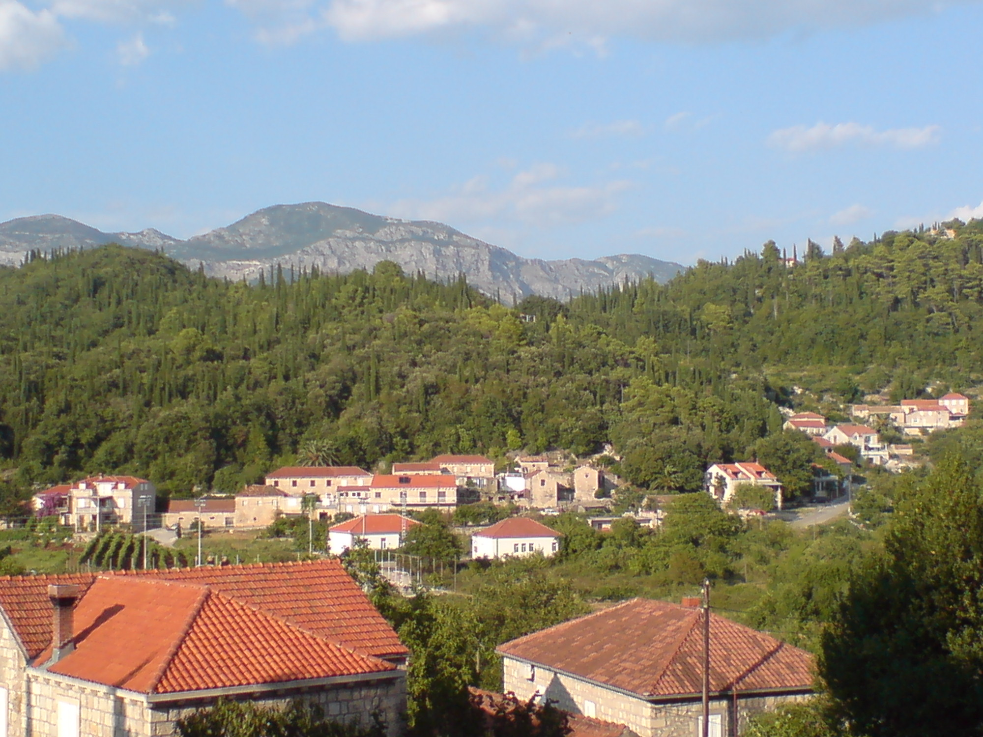 Popovići in Konavle, Croatia